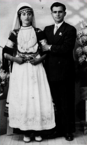 Νεόνυμφοι Καραγκούνηδες